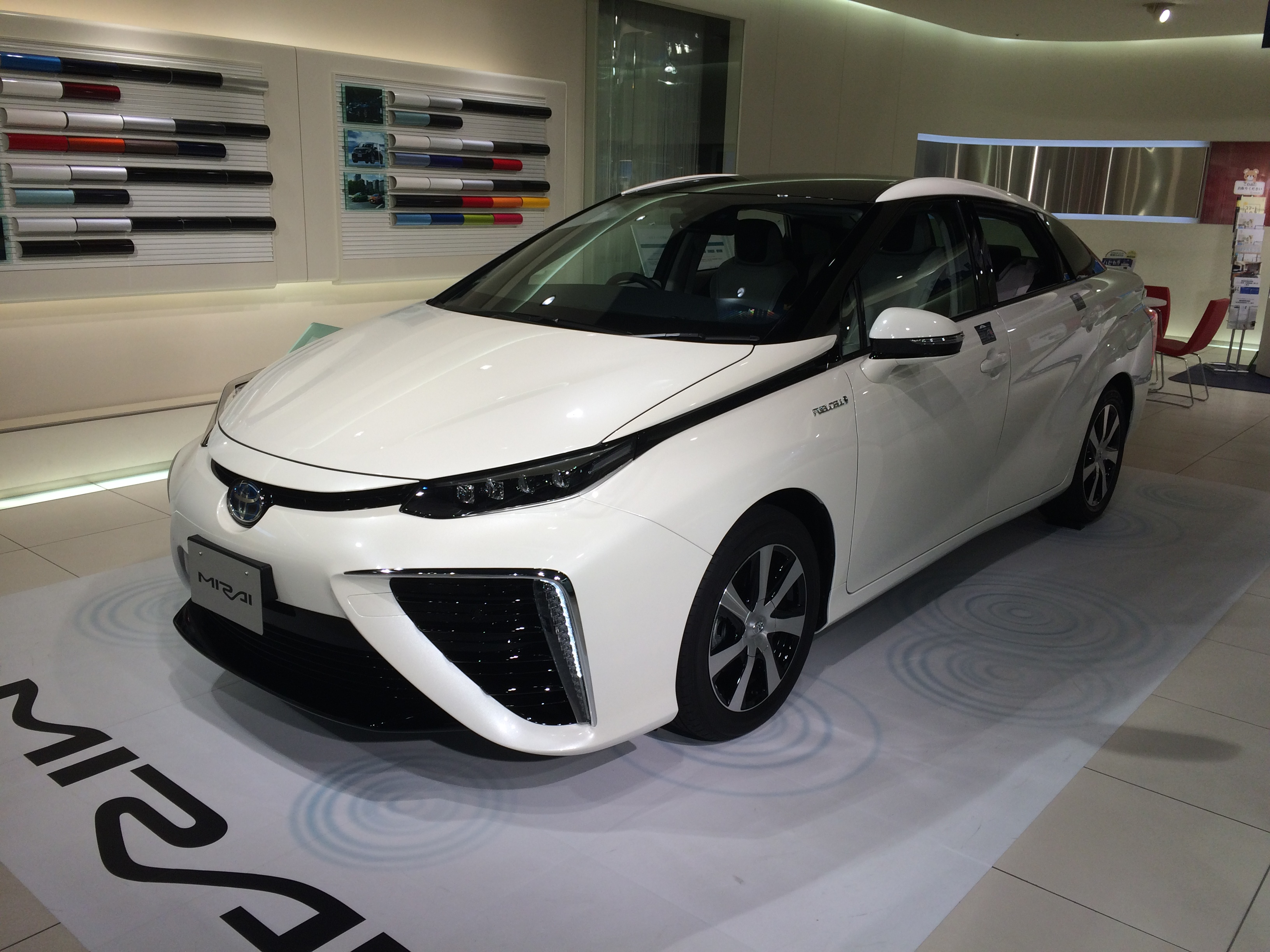 トヨタ・MIRAI